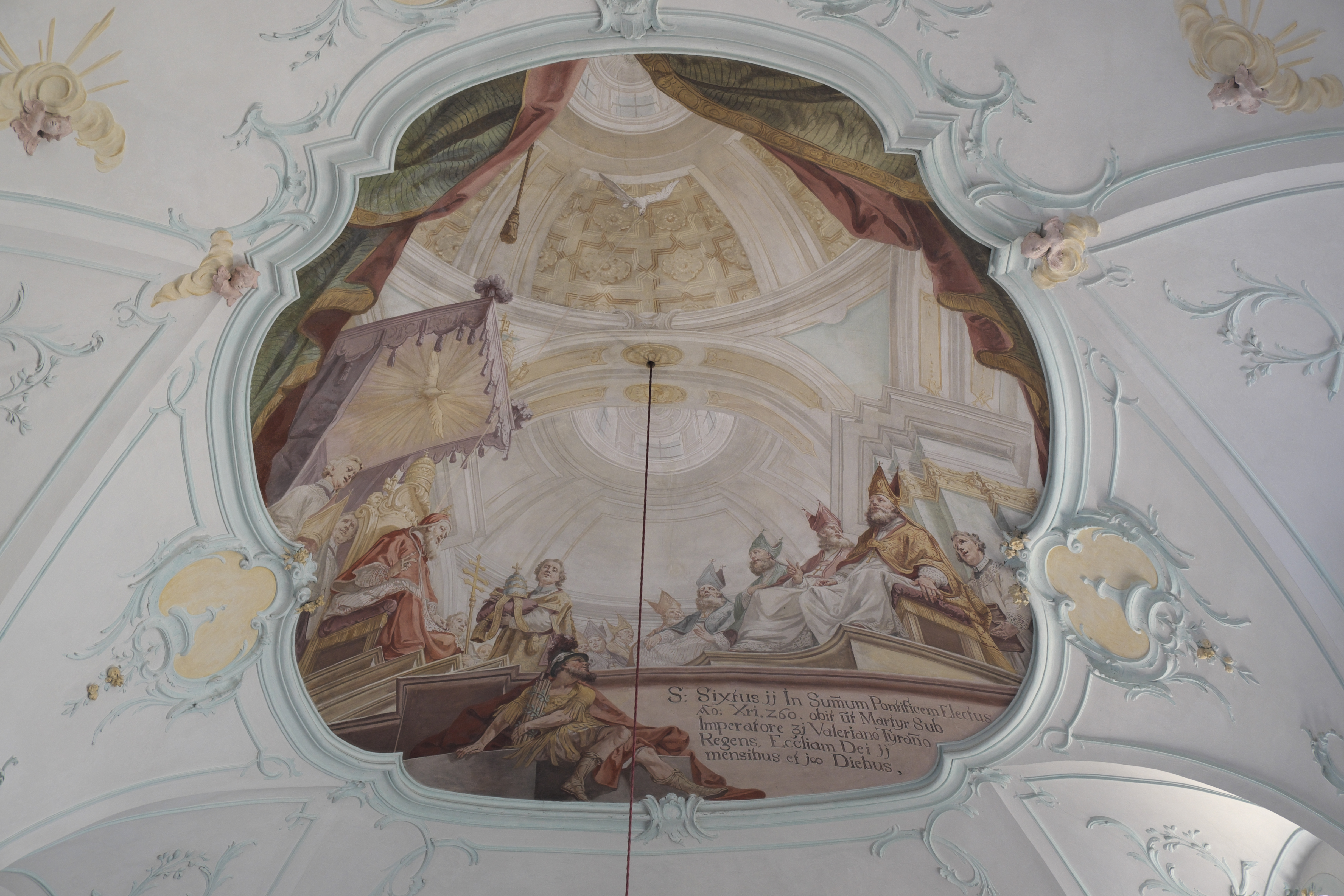 Katholische Pfarrkirche St. Sixtus in Moorenweis im Landkreis Fürstenfeldbruck (Bayern/Deutschland), Fresko von Matthäus Günther im Chor, von 1775; Darstellung: Wahl von Sixtus II. zum Papst